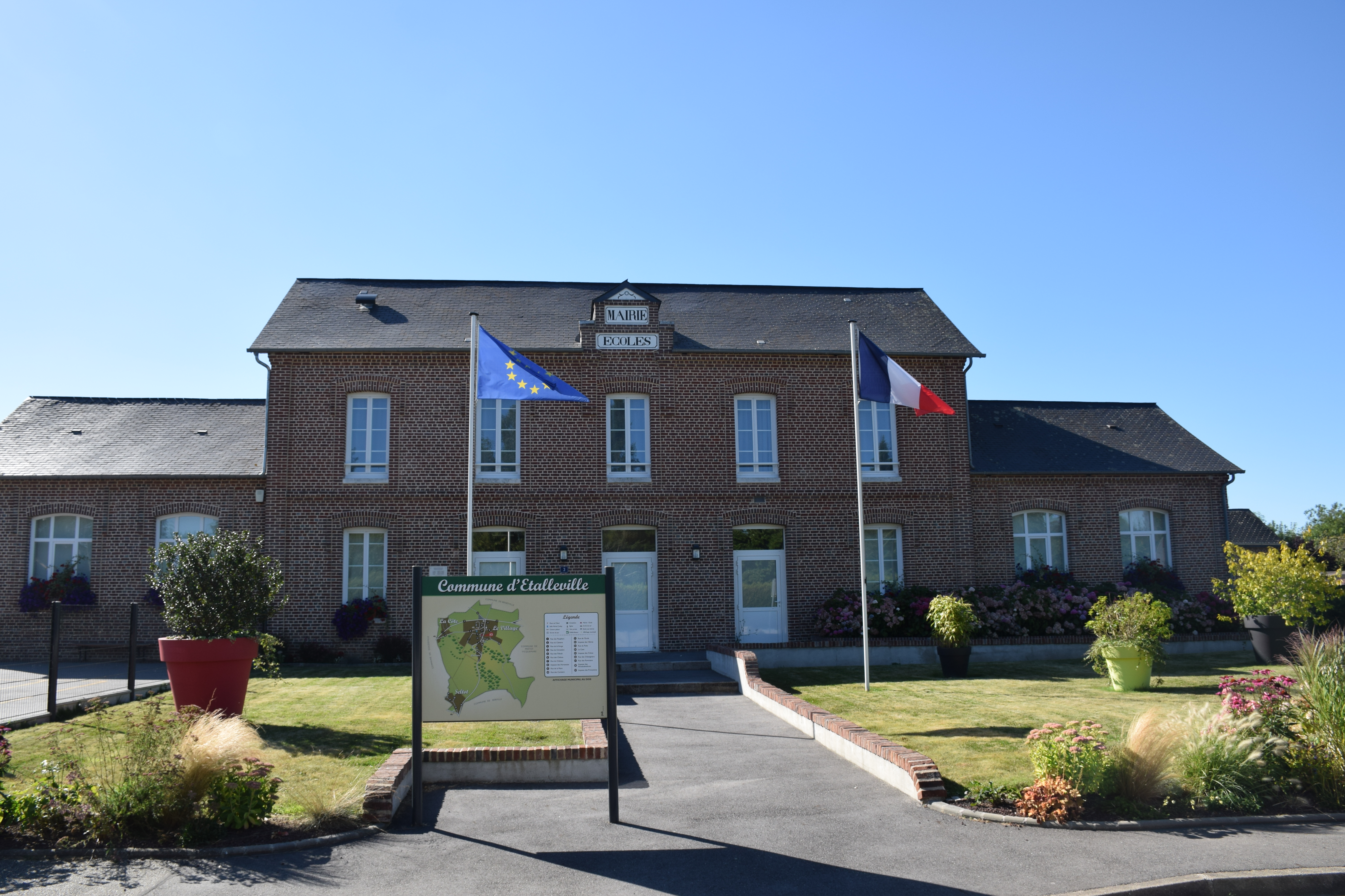 Mairie